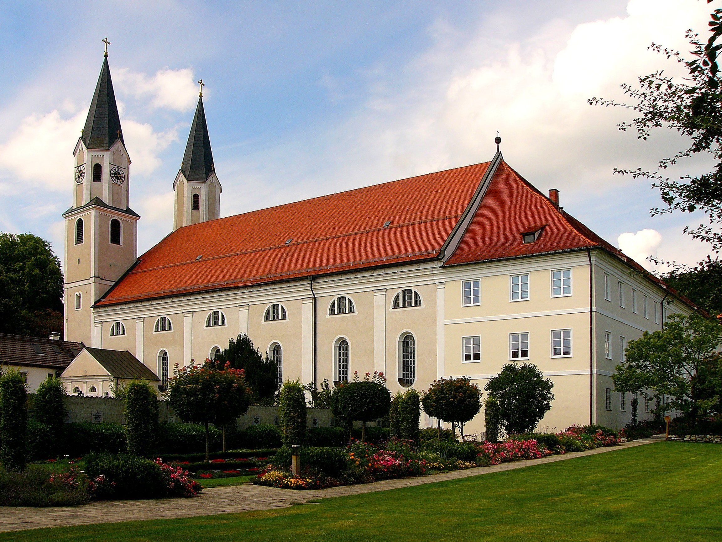 Redemptoristenkloster und Kirche Mariä Himmelfahrt in Gars am Inn.This is a photograph of an architectural monument.